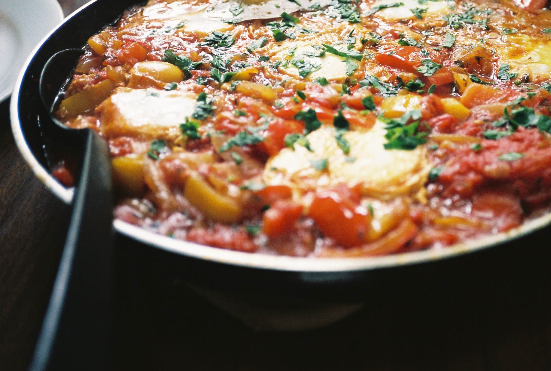 Shakshuka